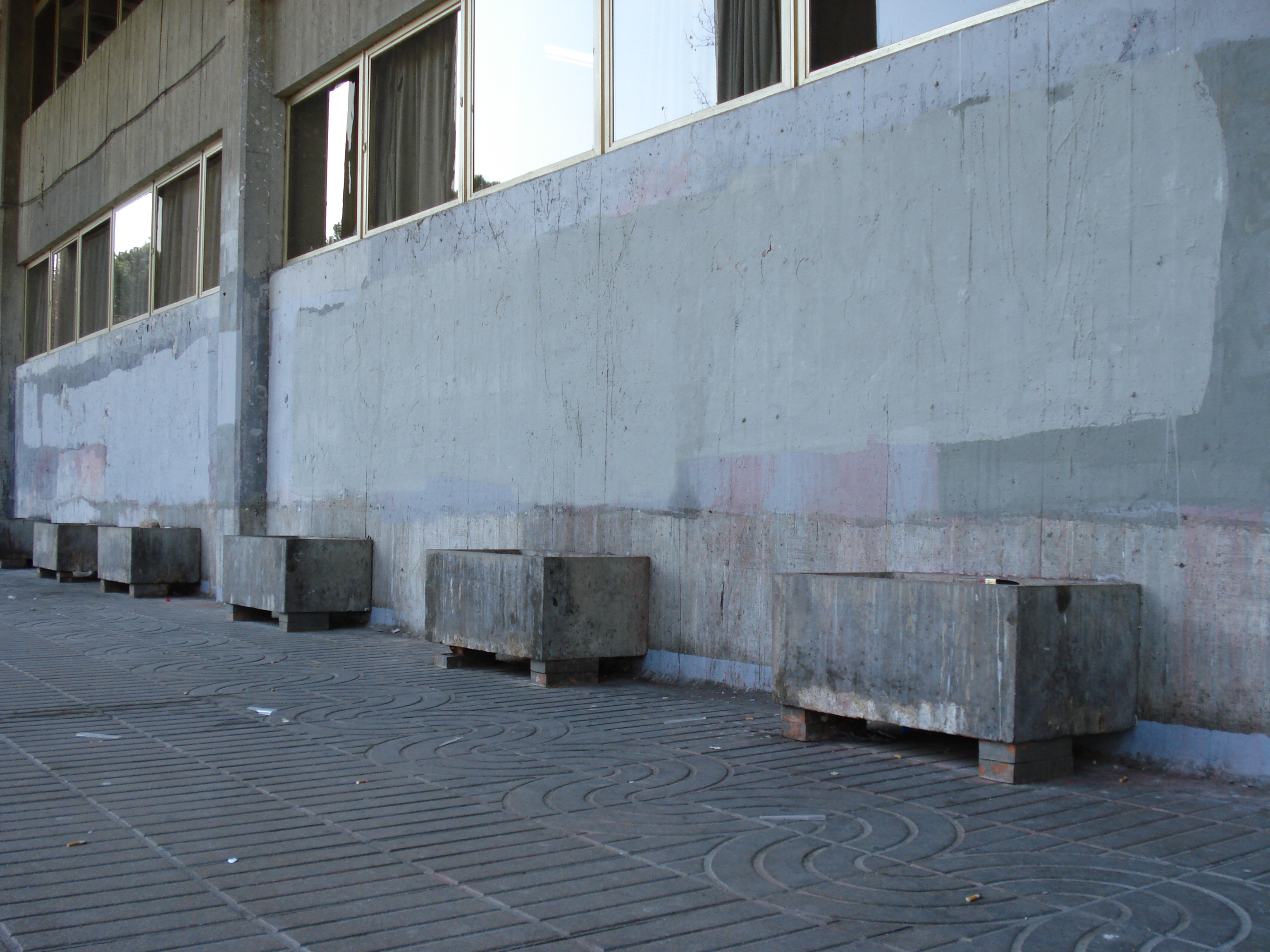 El lúgubre edificio en el que Alejandro Amenábar (Oscar por "Mar Adentro") rodó su primera película "Tesis". Donde otros estudian periodismo, documentación o publicidad y relaciones públicas, él estudiaba comunicación audiovisual. Los maceteros sirven de ceniceros o de papeleras.